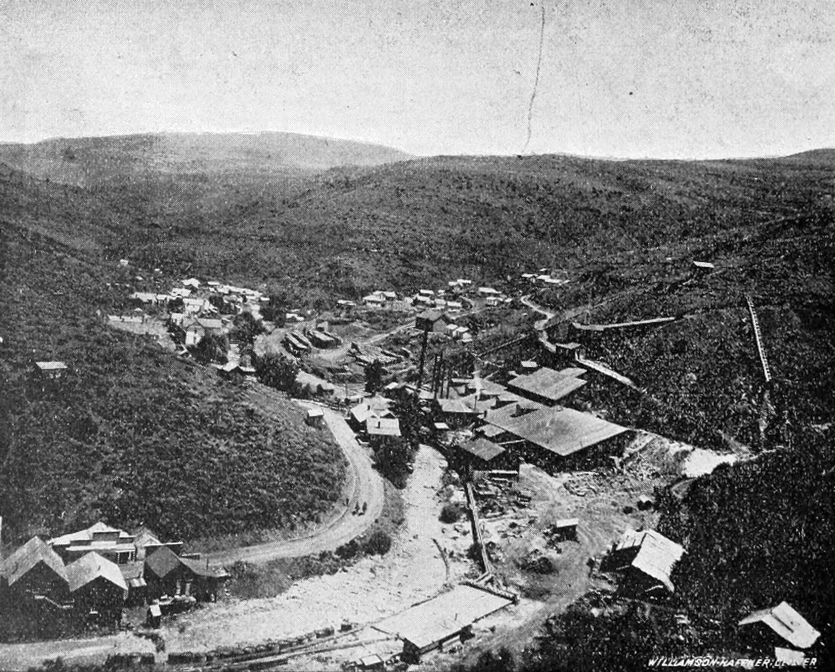 De Lamar, Idaho